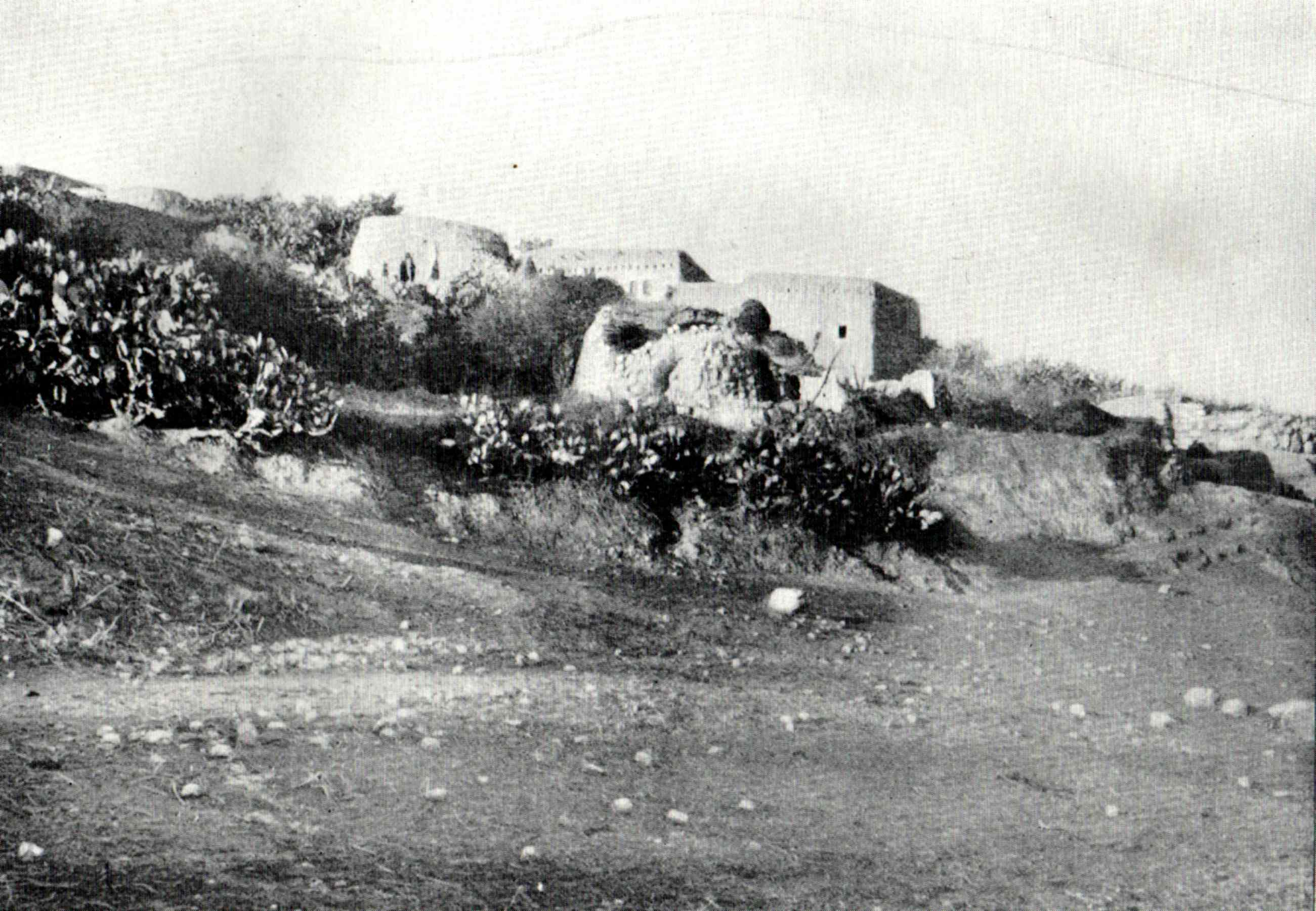 Endor, 1890